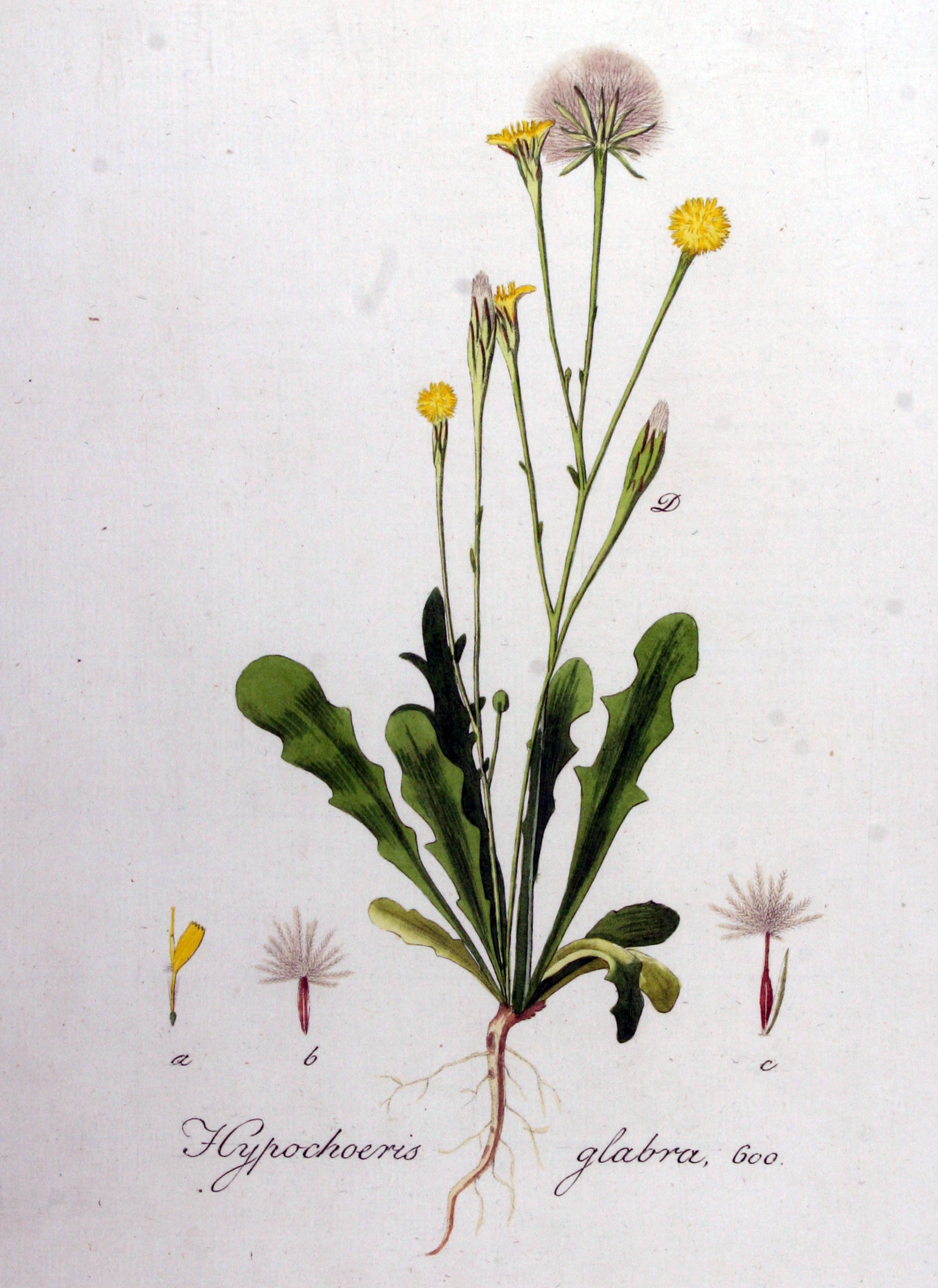 Hypochaeris glabra L.